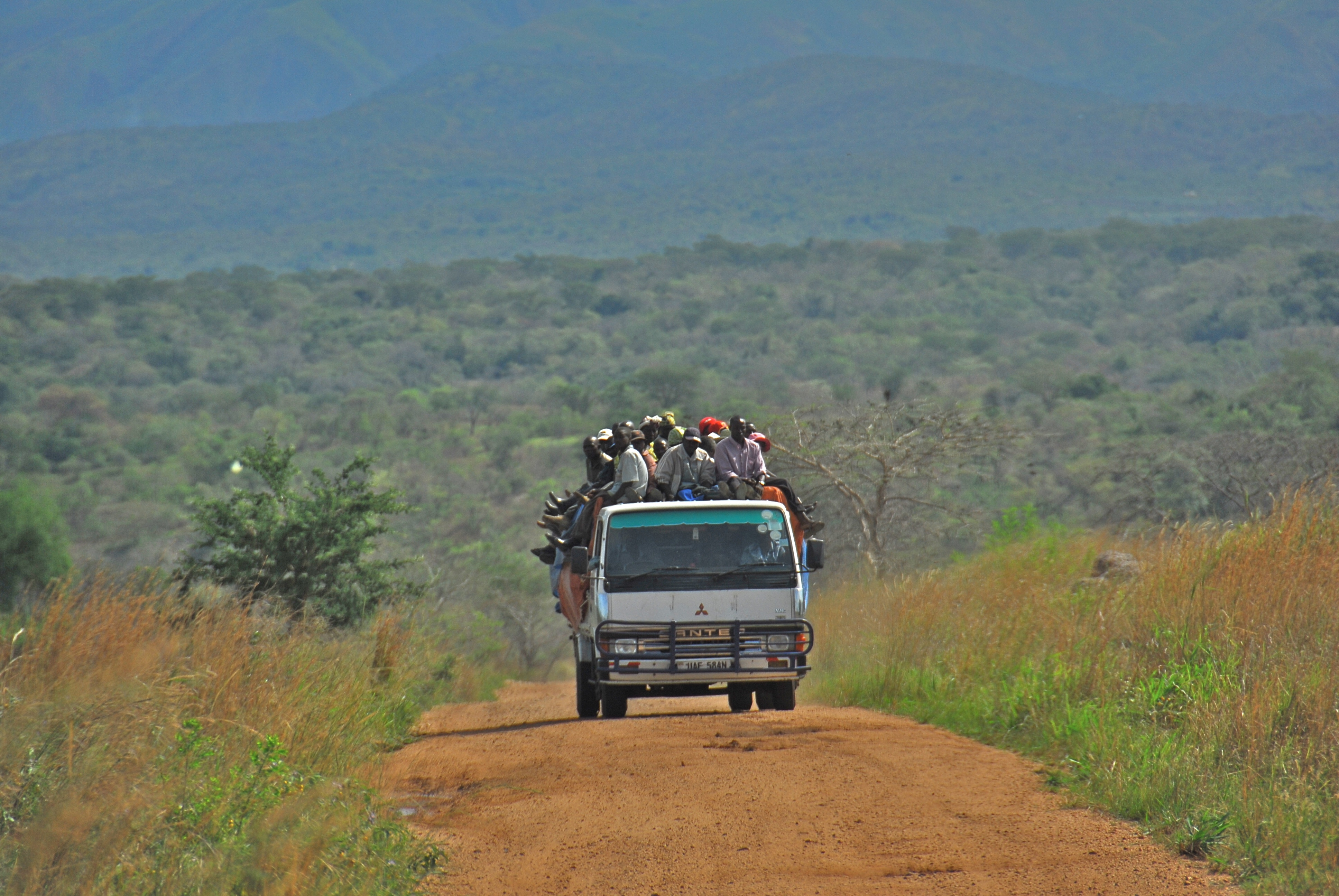 Road between Fort Portal and Rebisengo